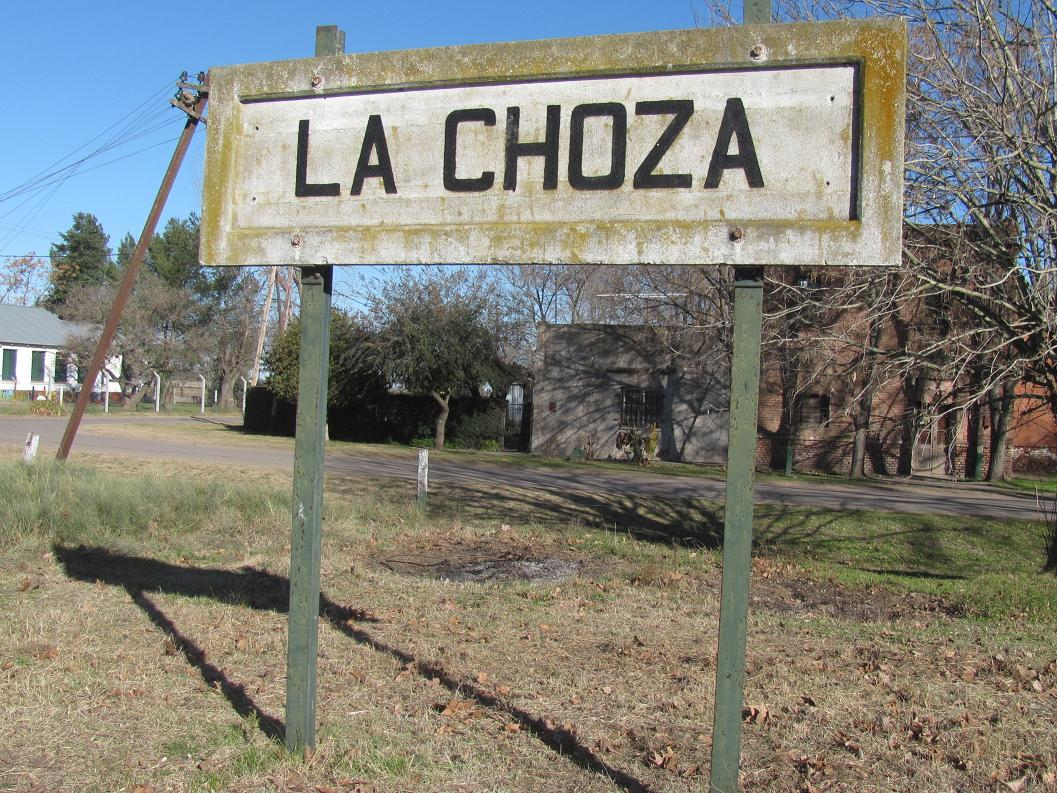 Estación La Choza, Buenos Aires.